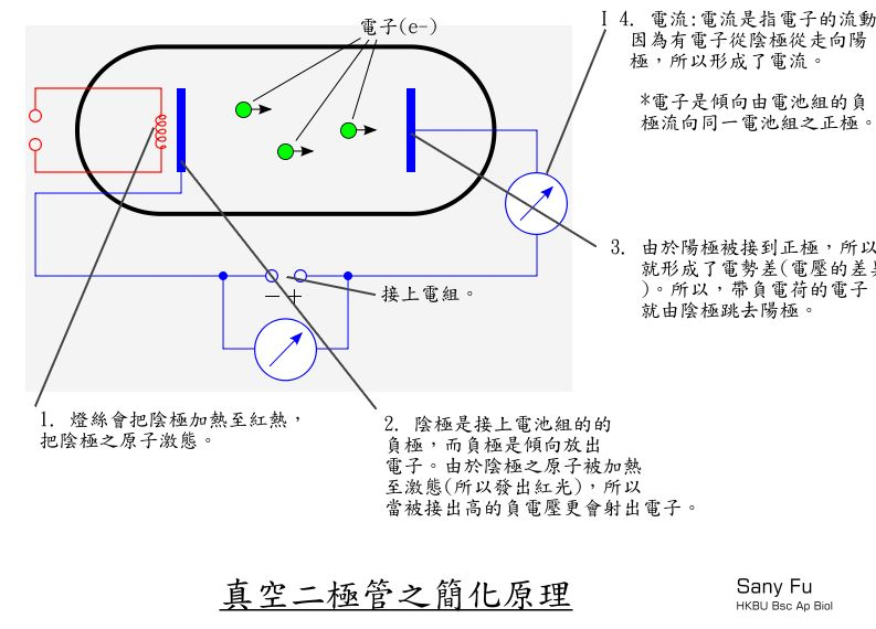 真空二極管之原理